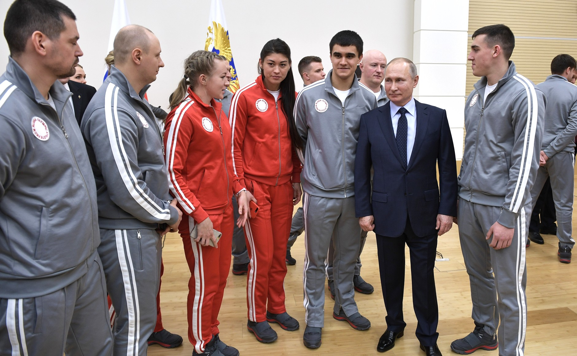 Встреча Президента России Владимира Путина с российскими спортсменами – участниками XXIII Олимпийских зимних игр 2018 года в Пхёнчхане.